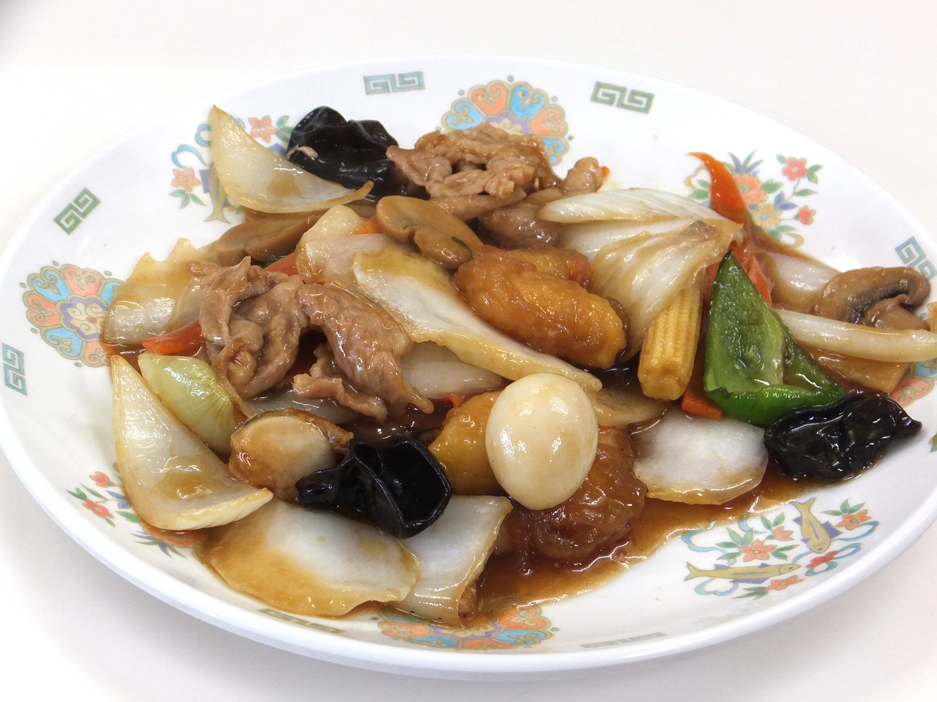 八宝菜。餃子の王将にて